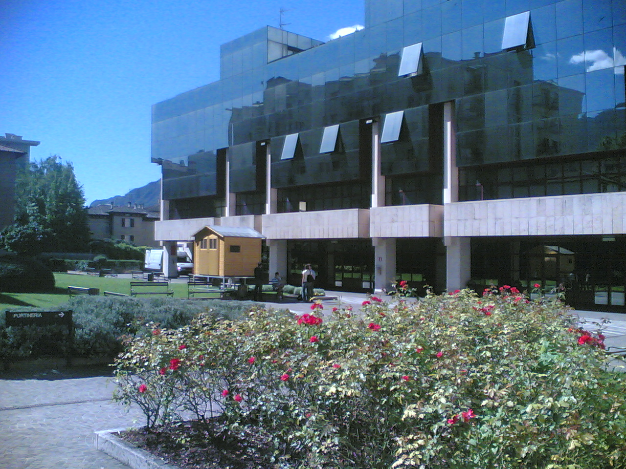 Foto scattata da me nell'autunno del 2007 col mio cellulare nokia 6630